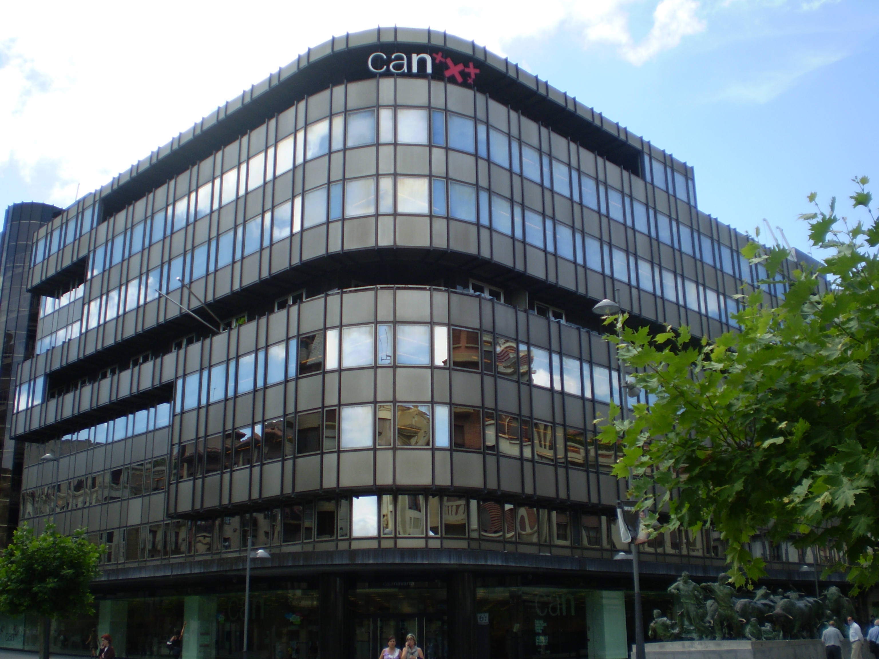 Sede central de Fundación Caja Navarra en la Avenida Pío XII de Pamplona (Navarra-España).